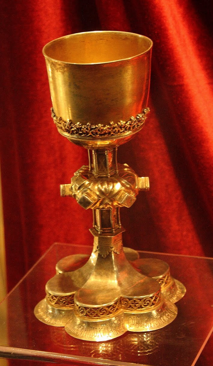 Мінск. Гістарычны музей. Пацір з Навагрудка